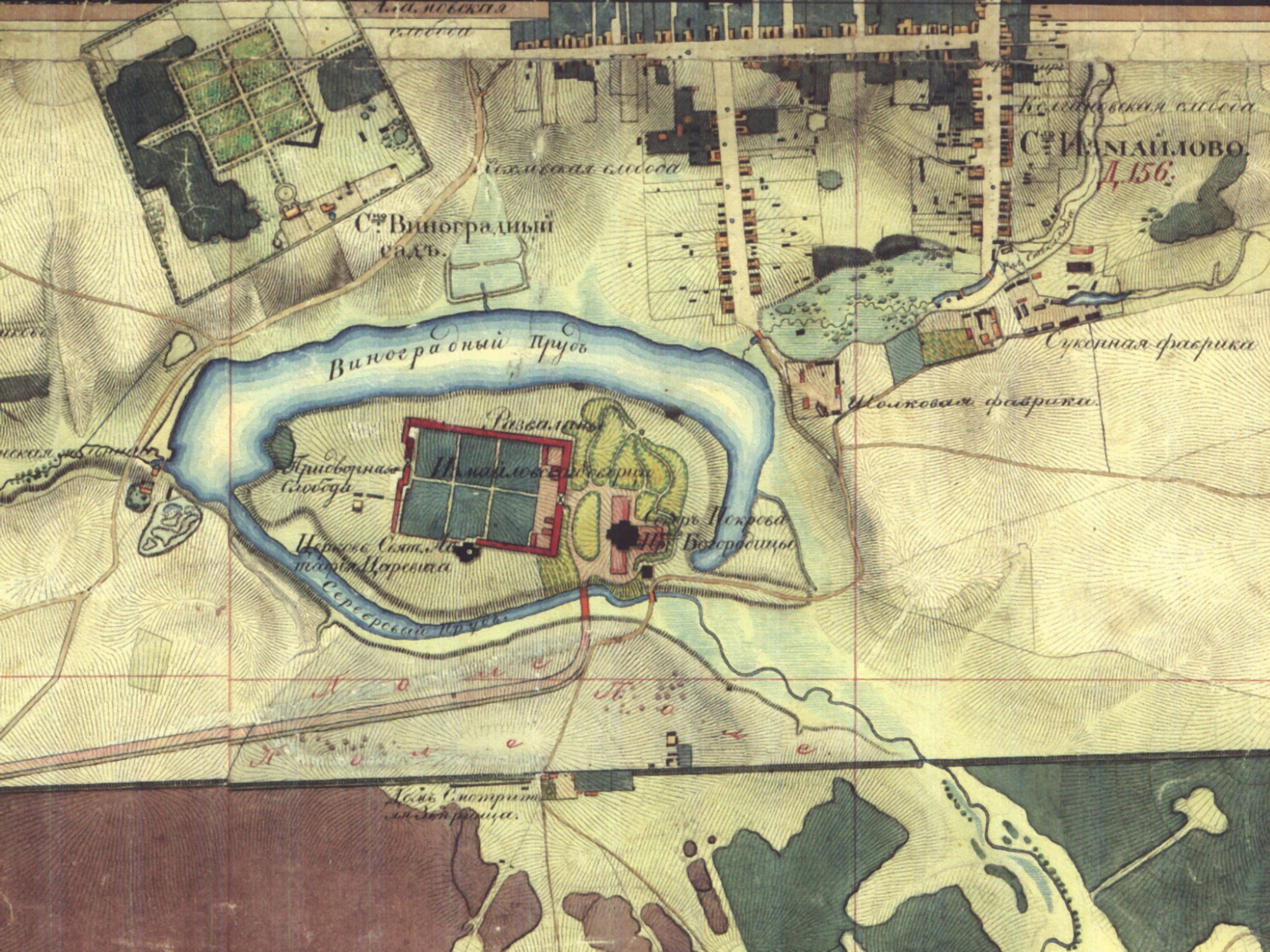 Показание Измайловского дворца на "Топографическом плане города Москвы" 1838 года.